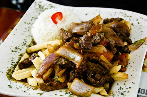 imagen de lomo saltado